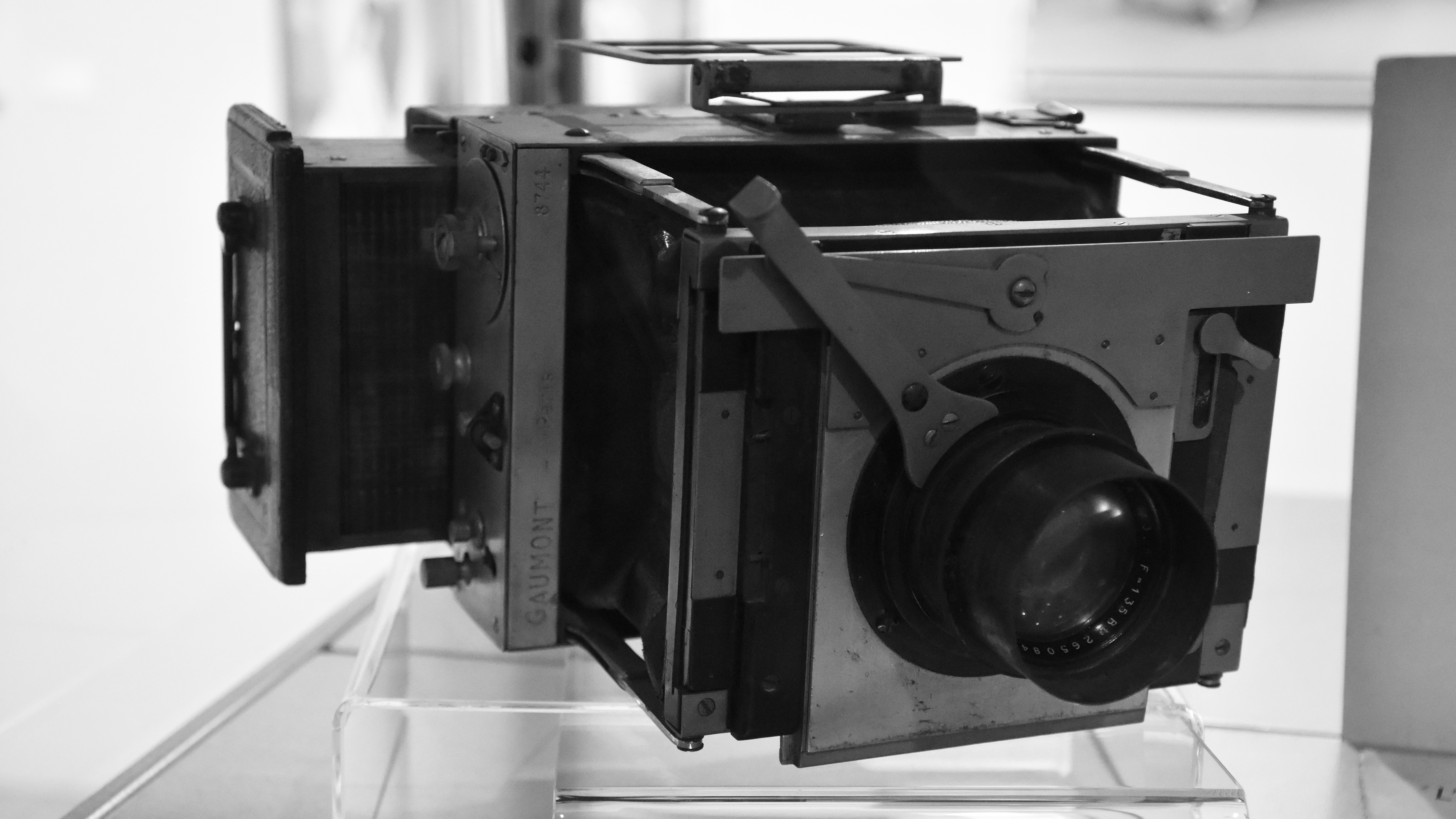 Fototoestel Spido reportage (Gaumont) FOMU Antwerpen